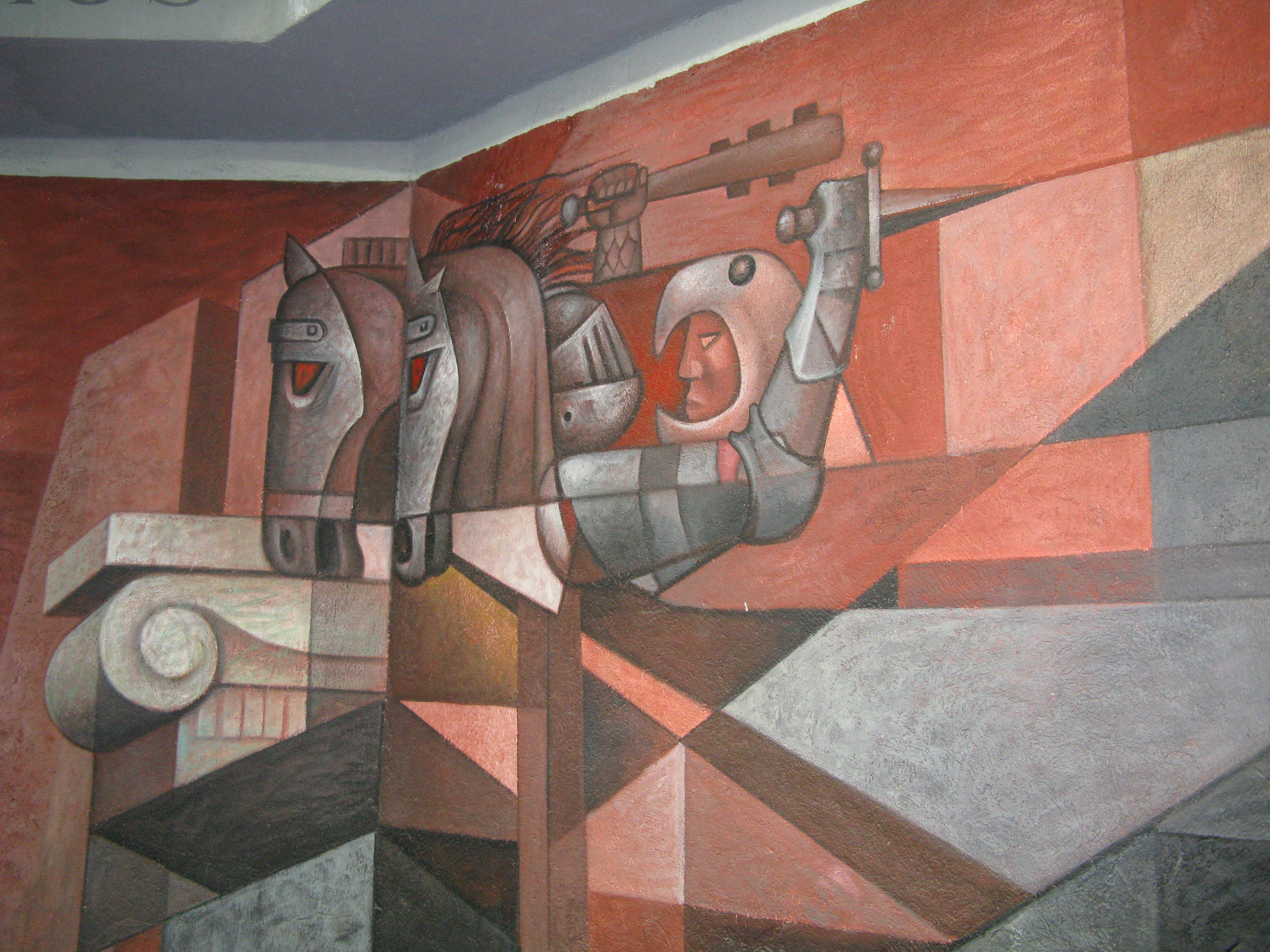 Parte del mural "Presencia de América Latina", ubicado en la Casa del Arte, Universidad de Concepción, Chile